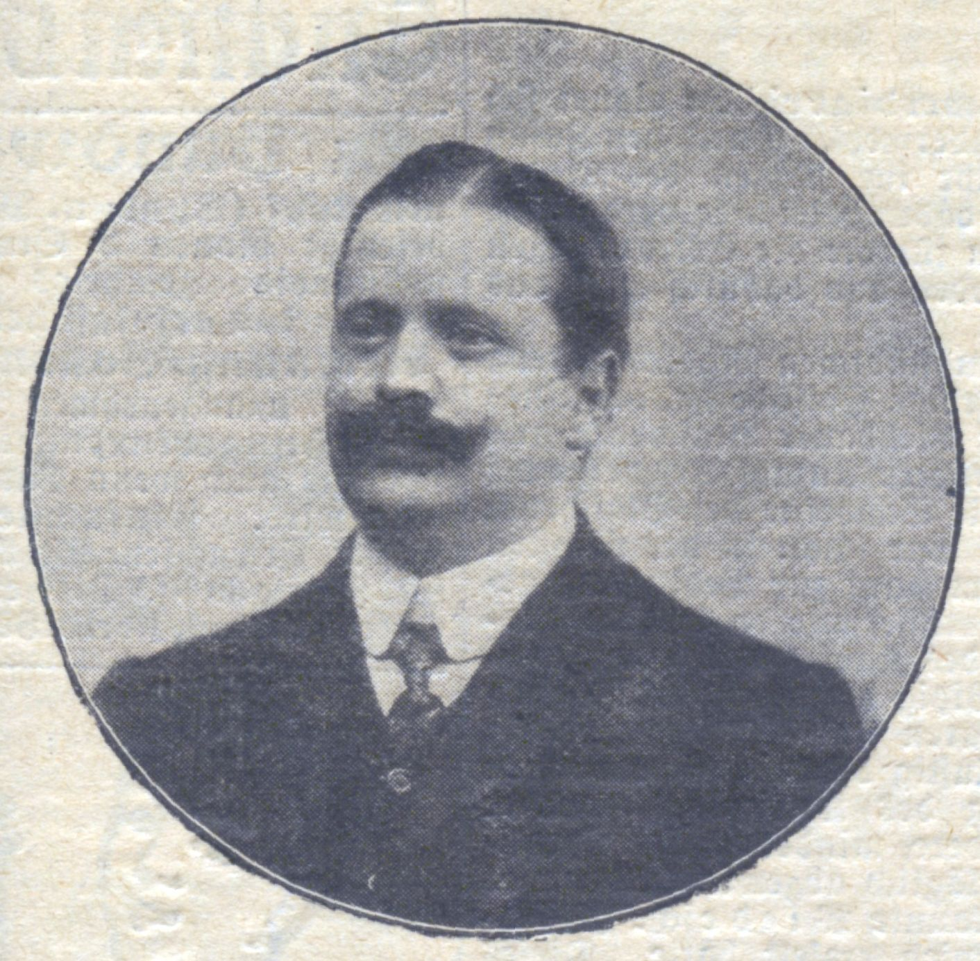 Porträtfoto von Gottfried Rückle